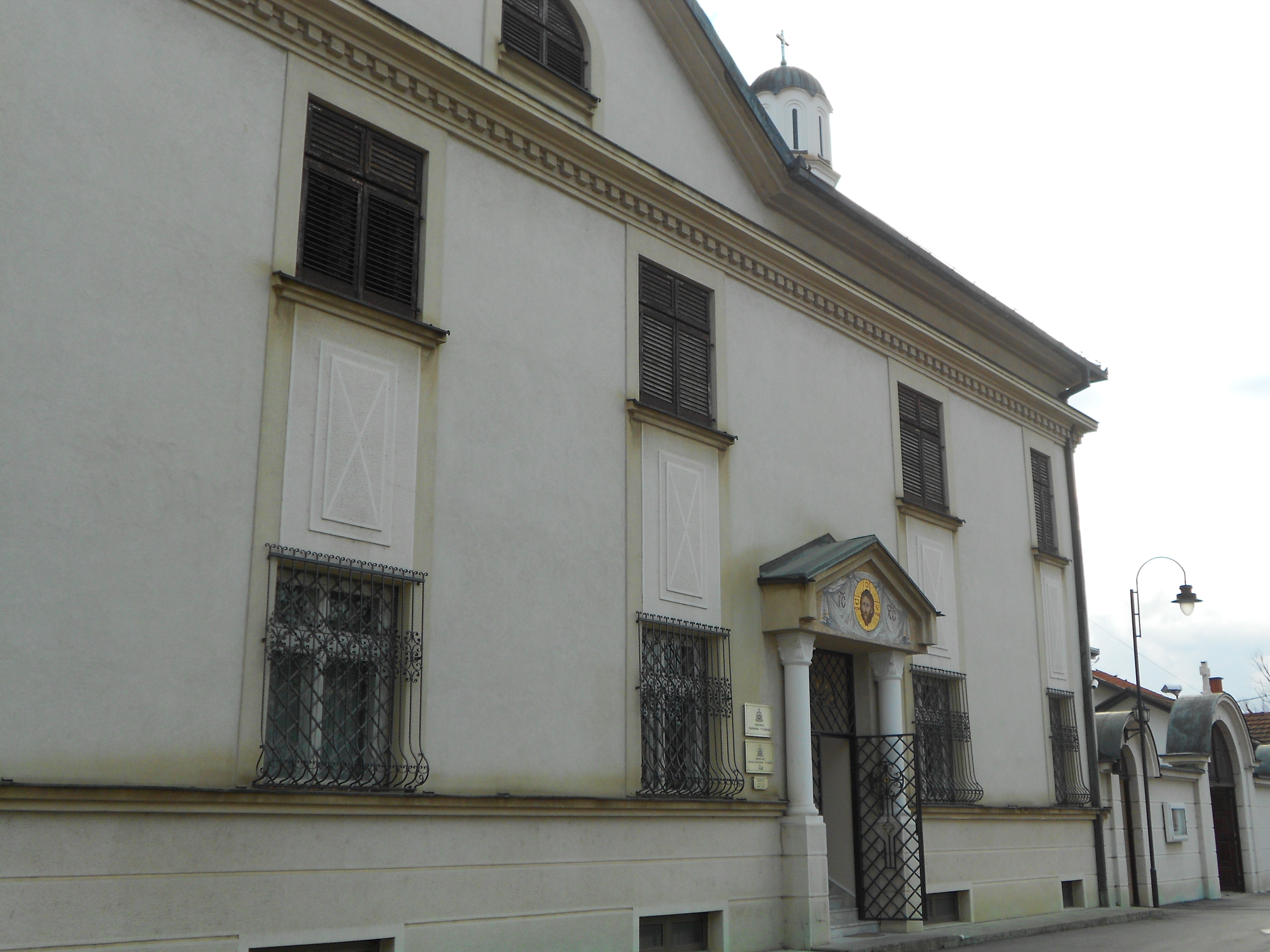 Библиотека Епархије зворничко-тузланске